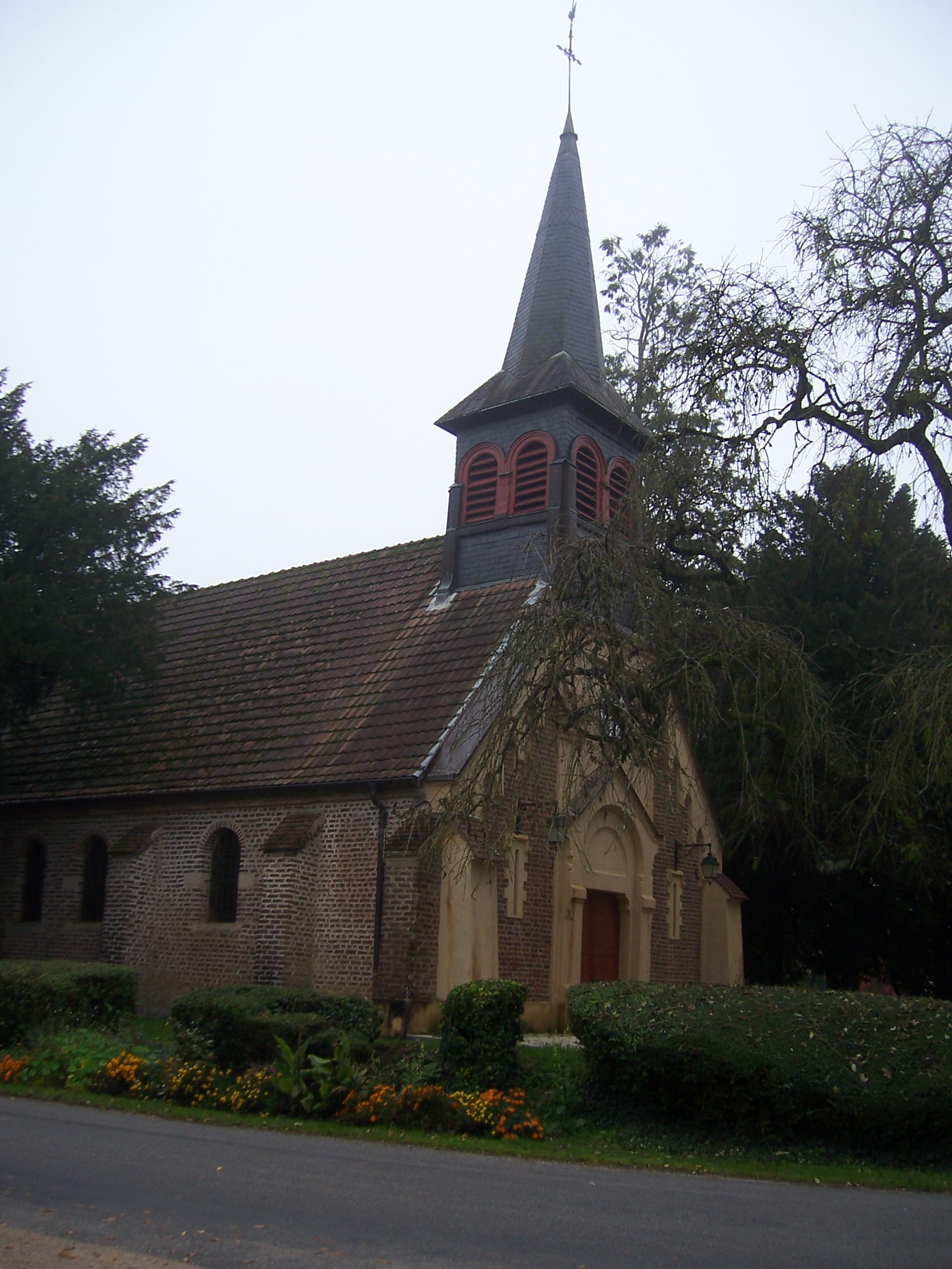 Eglise de Serley